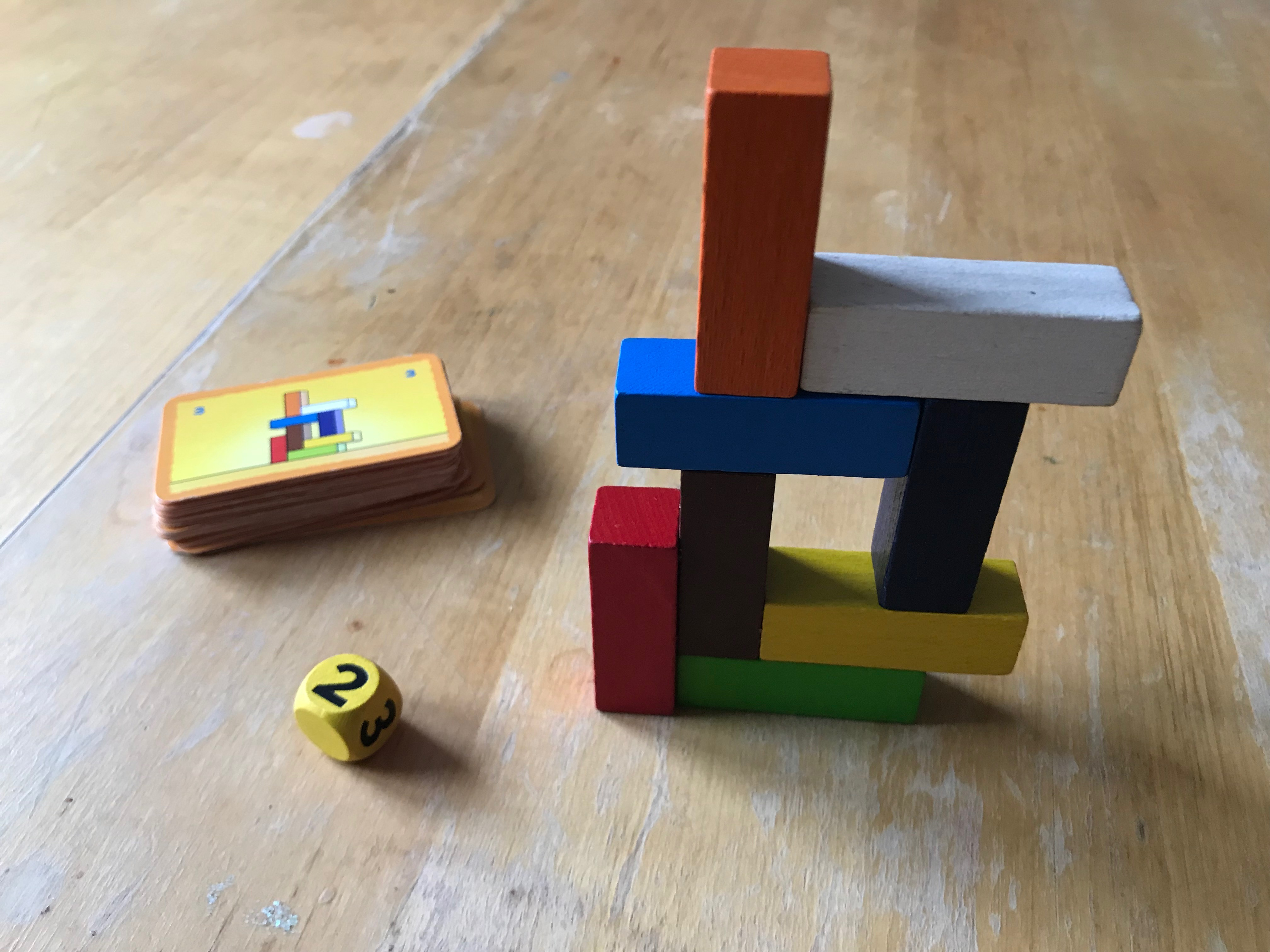 Spielmaterila der Miniversion von Make 'n' Break